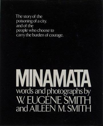 Llibre recopilatori d'imatges de la catàstrofe de Minamata.